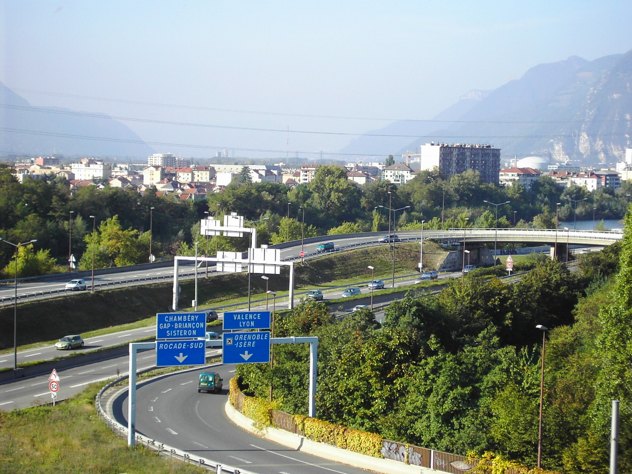 échangeur de la rocade Ouest bordant le parc Ampère-Vallier à droite.